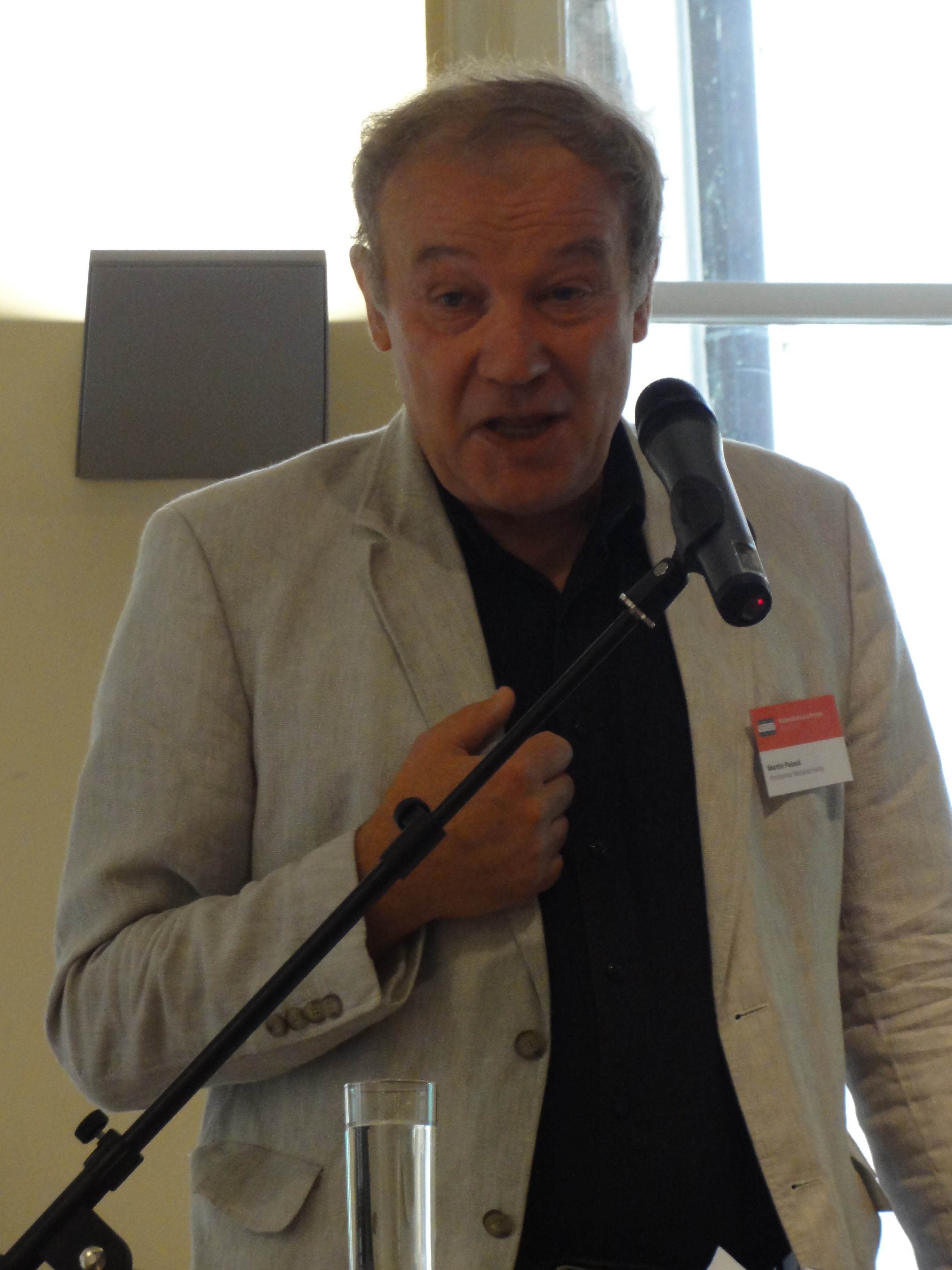 Martin Palouš na konferenci "Federalismus a Evropa" pořádané Knihovnou Václava Havla.